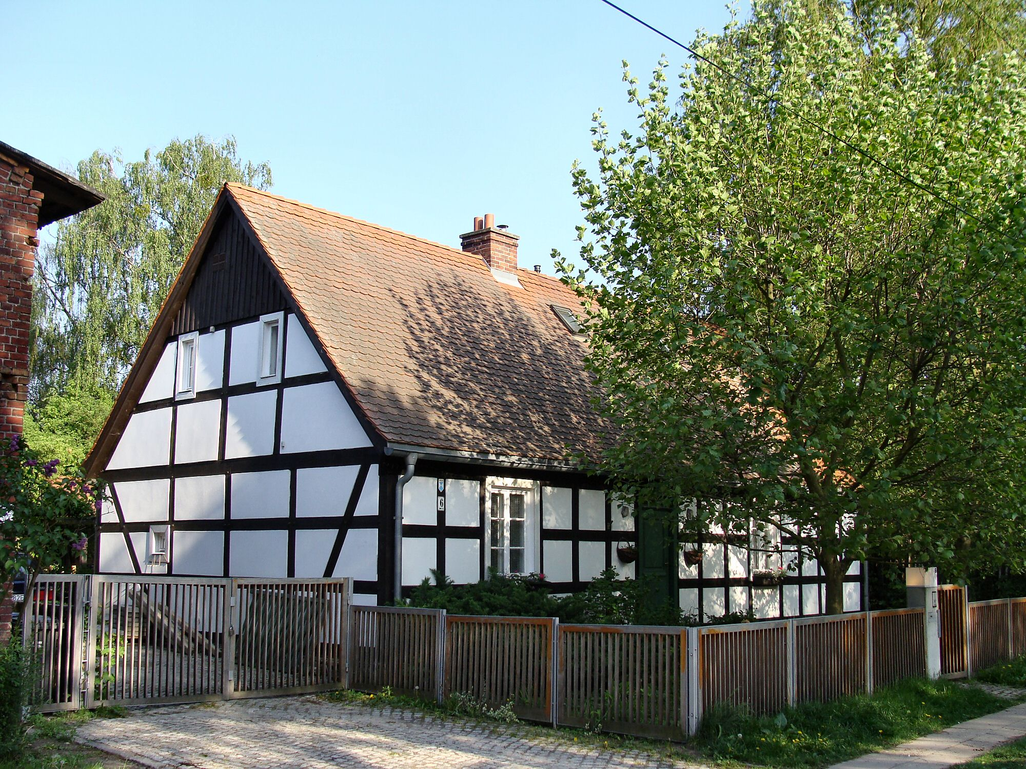 Szczecin Krzekowo, ul. Szeroka 6 - ryglowa chałupa (zabytek nr rejestr. 1120)